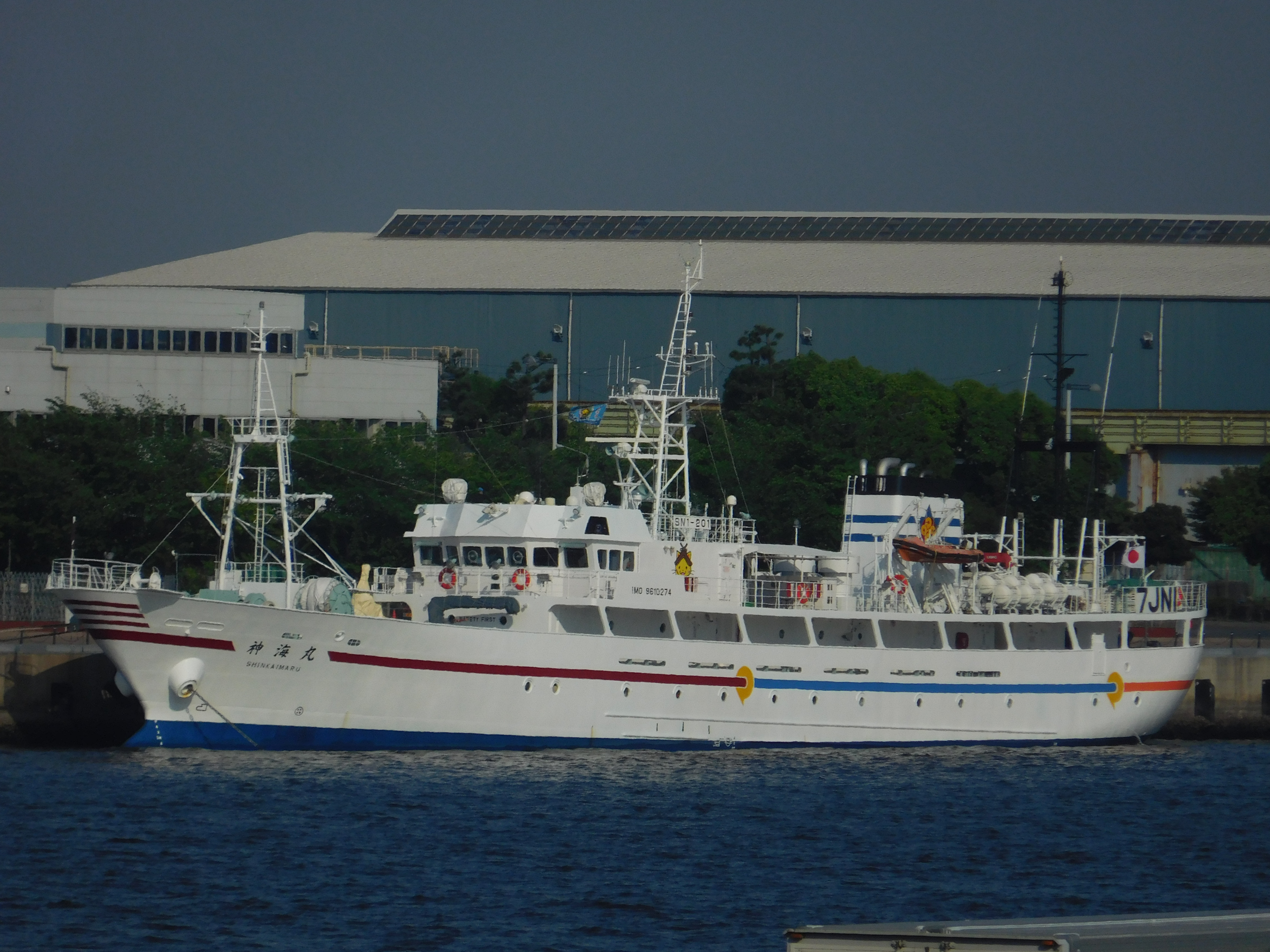 島根県の練習船４代目神海丸 東京港に着岸、横から